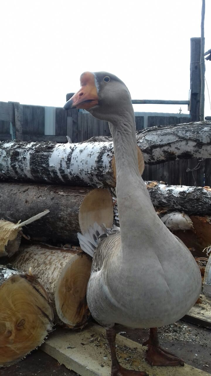 Наш "главнокомандующий"!